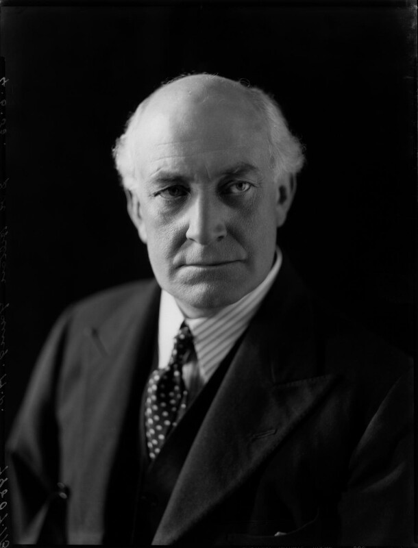 Lord Kennet